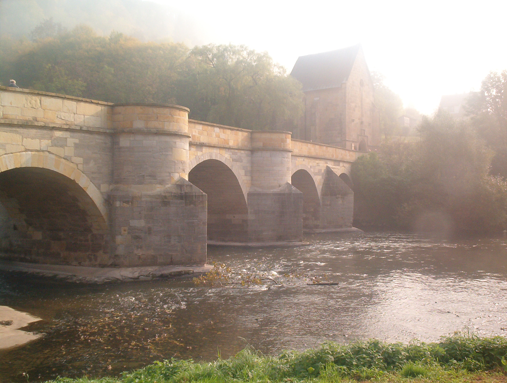 Werrabrücke und Liboriuskapelle in Creuzburg im Morgennebel